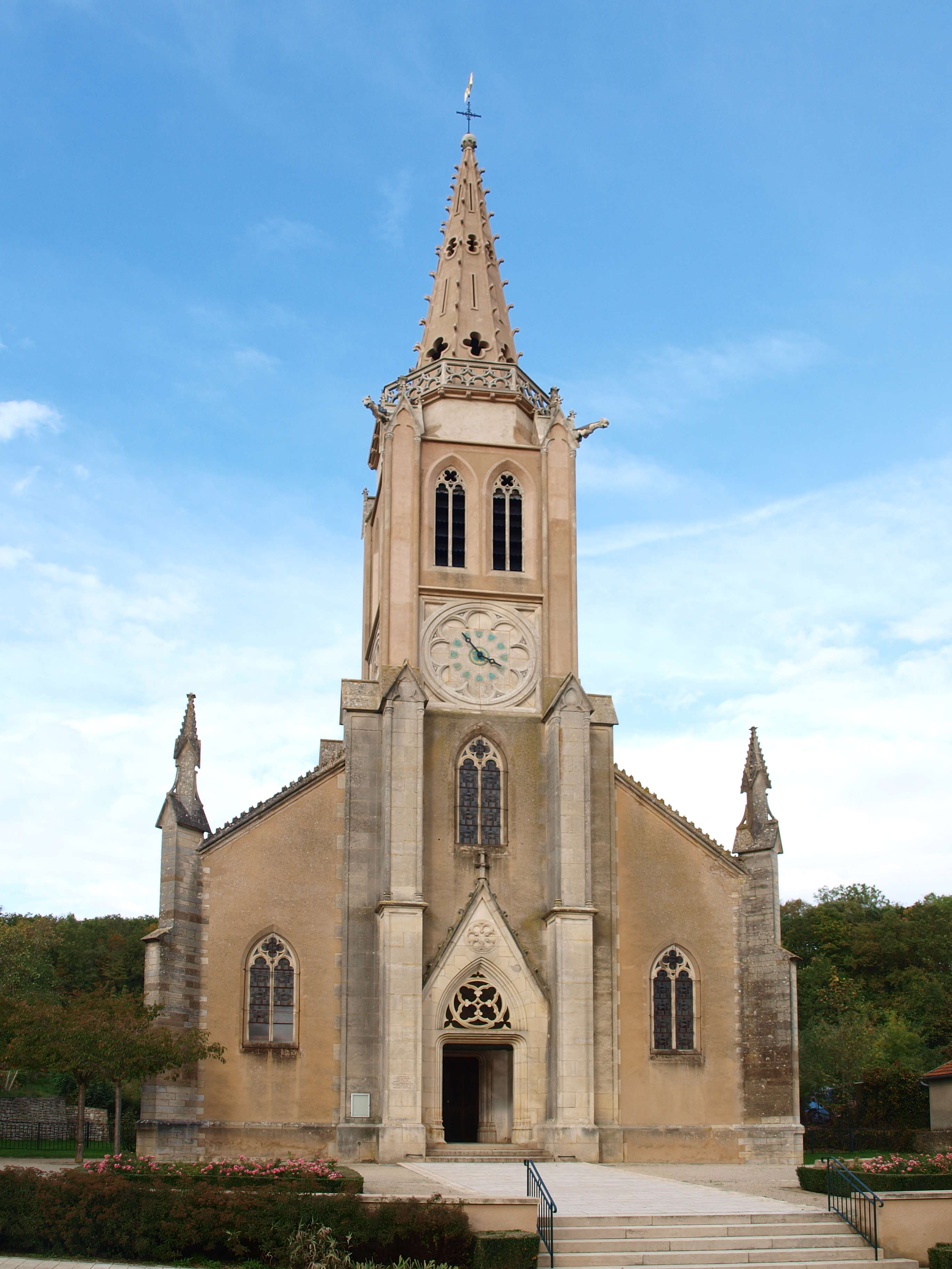 Étaule (Yonne, France) ; hameau de Wassy, son église.